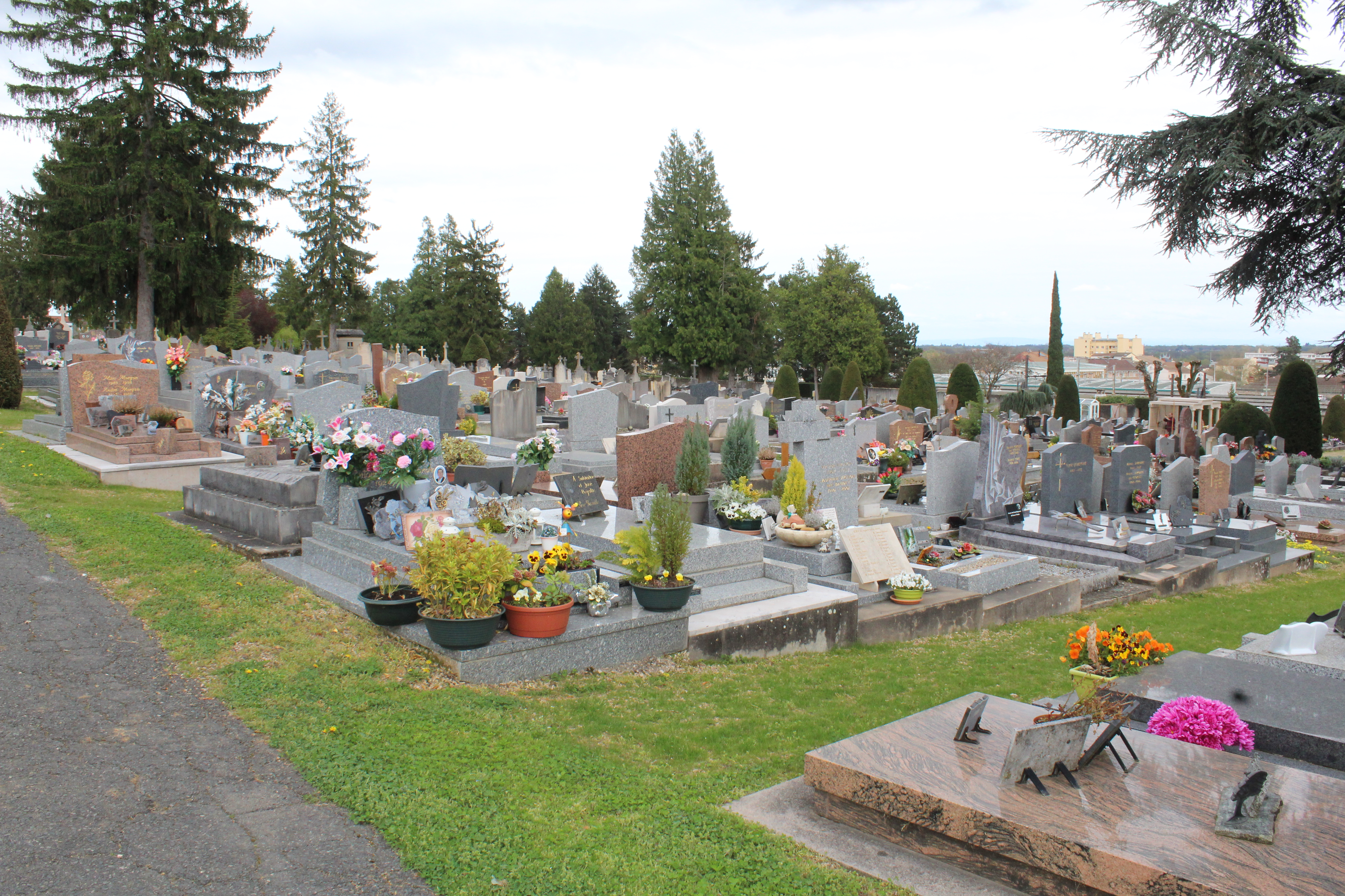 Cimetière Saint-Brice, Mâcon.